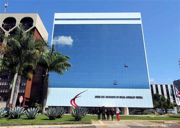 Sede do Conselho Federal da Ordem dos Advogados do Brasil